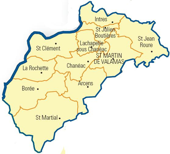 Carte détaillée des communes du canton (Ardèche)